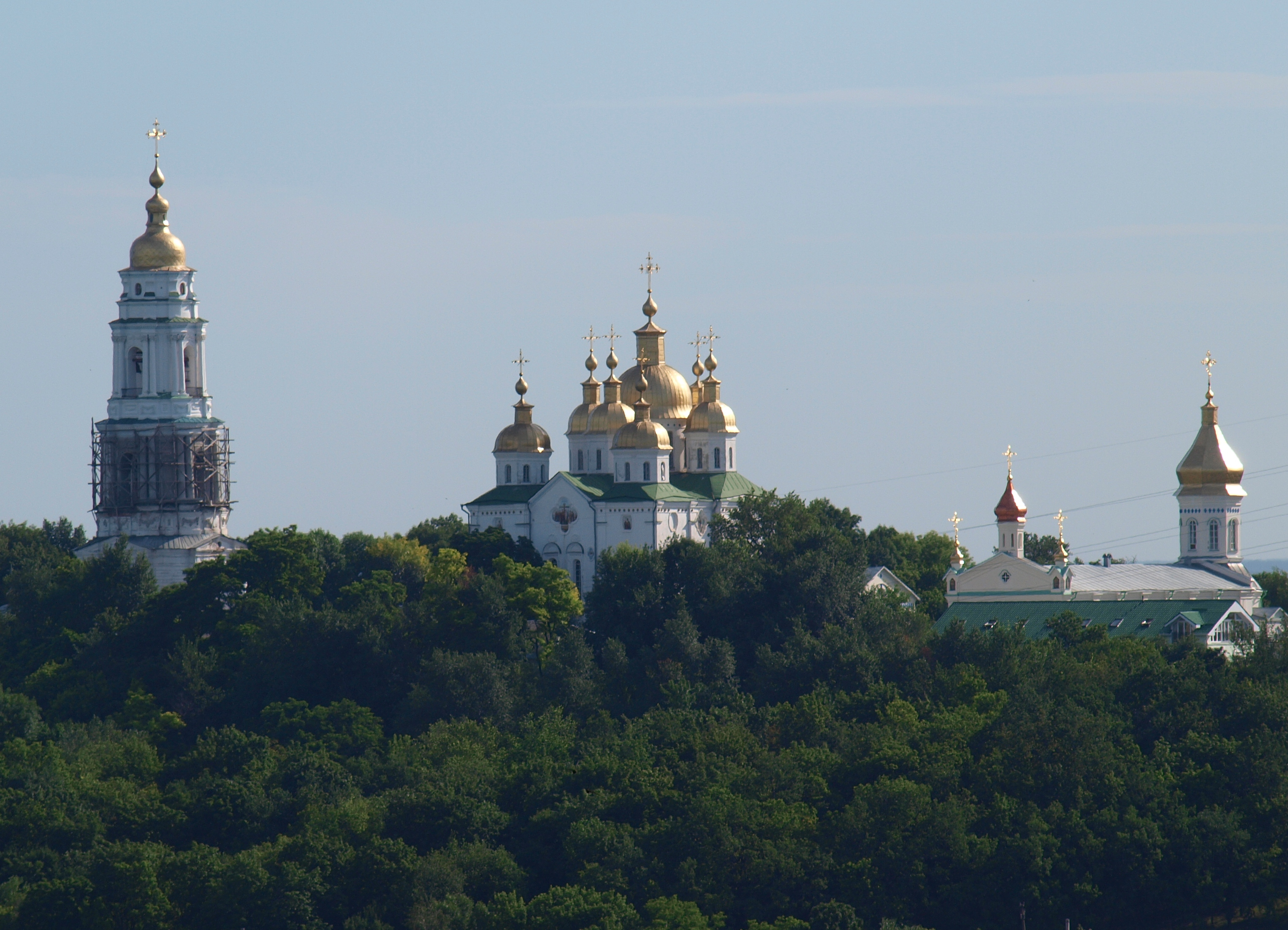 Полтавский Крестовоздвиженский монастырь